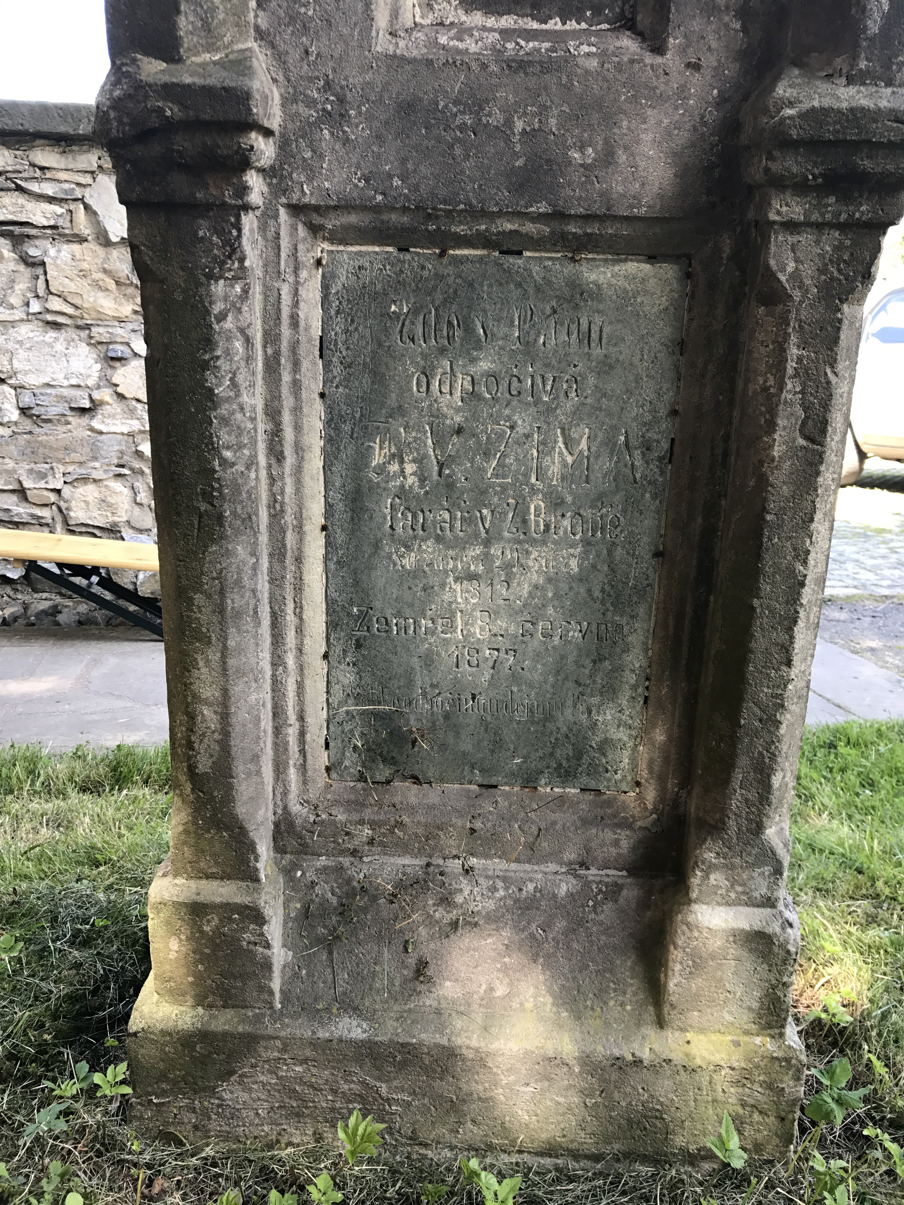 R.D. V. Zima, farář v Železném Brodě, 1812-1877, náhrobní kámen